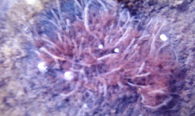 A Blendecques (France), dans le fleuve Aa, dans les années 1985-1990, les sédiments constitués ici principalement des rejets chroniques de 3 papeteries à la station d'épuration de capacité insuffisante et dysfonctionnant, offrent un habitat de choix aux tubifex dans les zones les plus anoxiques (et aussi au chironome plumeux dans les zones moins asphyxiées où l'en trouvait des milliards de larves). Le tubifex est l'un des rares organismes invertébrés (avec une sangsue brune) à survivre dans les sédiments très chargés en matière organique en décomposition et les plus pauvres en oxygène). On les trouve souvent en groupe comme sur cette photo. Si l'eau est un peu moins polluée, on trouve aussi les larves de certains chironomes plumeux